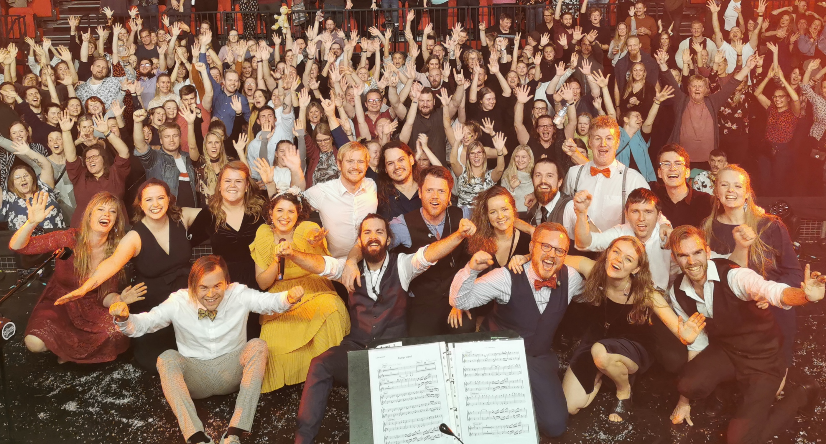 Luftens Helte efter koncert på Skråen i Aalborg i 2019.